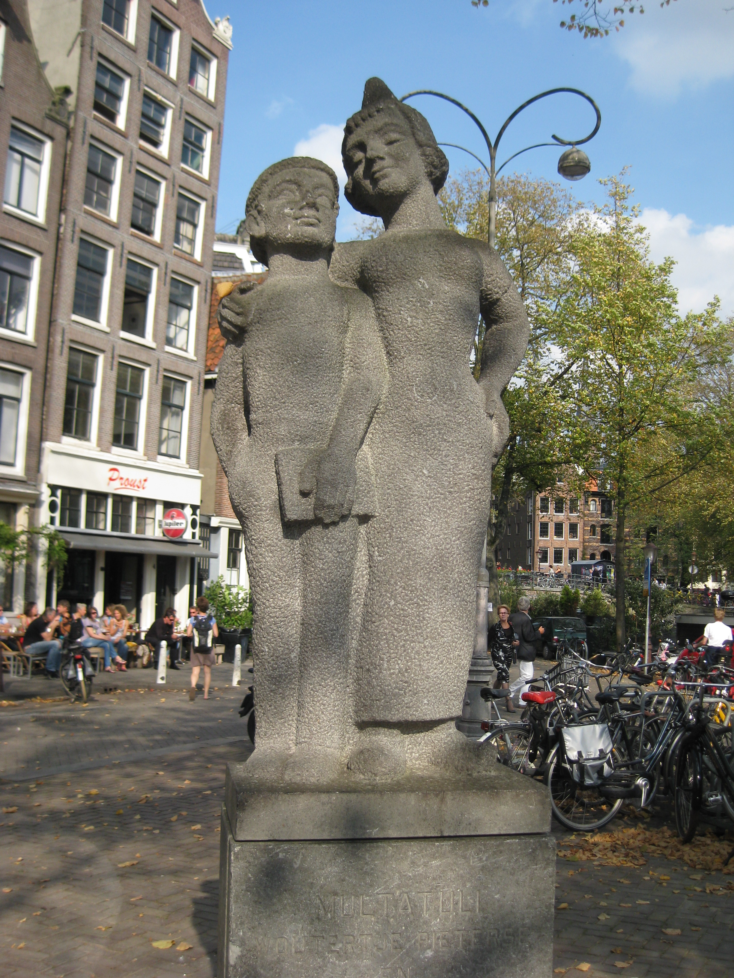 Standbeeld Woutertje Pieterse en Femke, Noordermarkt, Amsterdam Frits Sieger, 1971. Naar het verhaal De Geschiedenis van Woutertje Pieterse van Multatuli